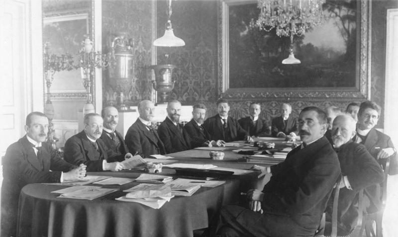 10 jahre Weimarer Verfassung Die erste Kabinettssitzung in Weimar mit Scheidemann, Wissell, Brockdorf-Rantzau, Gotheim, Koch, Bell und Noske No. 6295 Information added by Wikimedia users.Kabinett Scheidemann 13. Februar 1919 – 20. Juni 1919